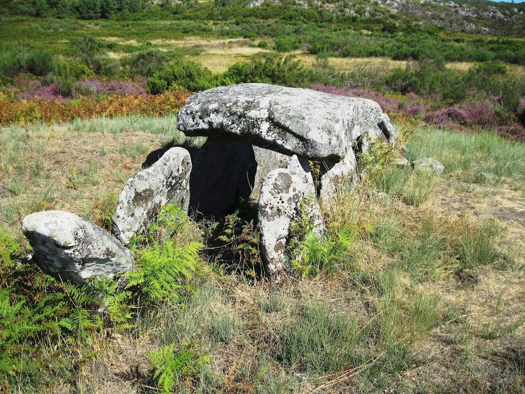 Num pequeno planalto, com abundância de água, é cercado por flores de varias cores, que muito embelezam o lugar